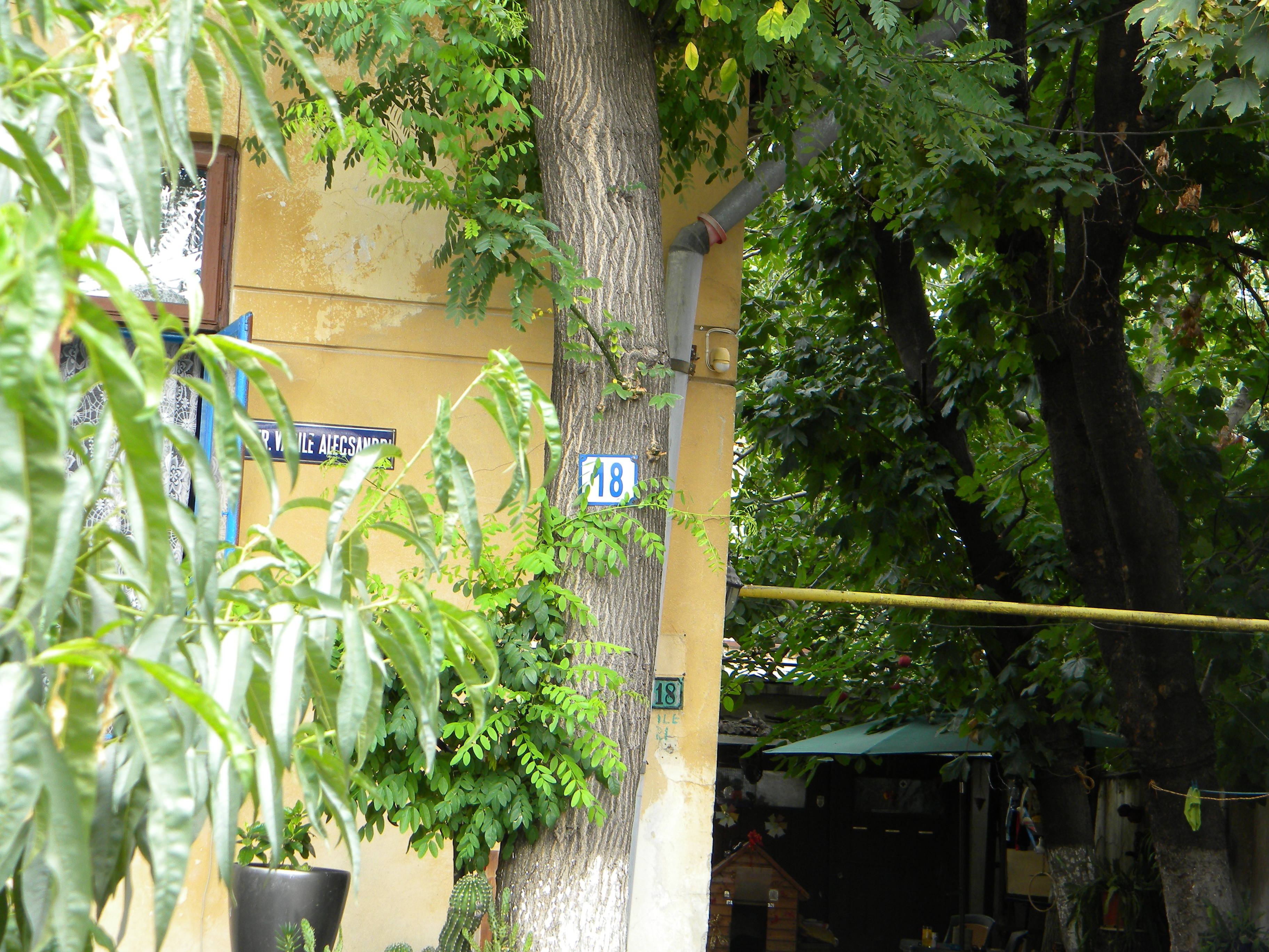 Bucuresti, Romania, Casa pe Str. Vasile Alecsandri nr. 18; B-II-m-B-17948 (detaliu 1)